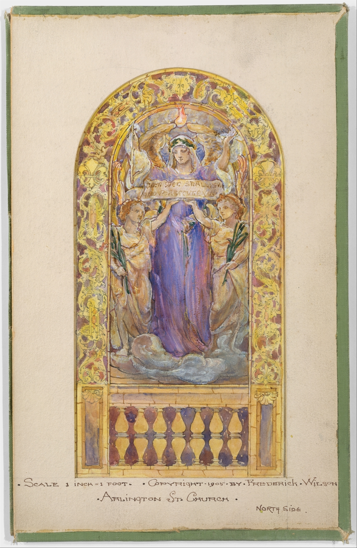 American; Drawing; Drawings